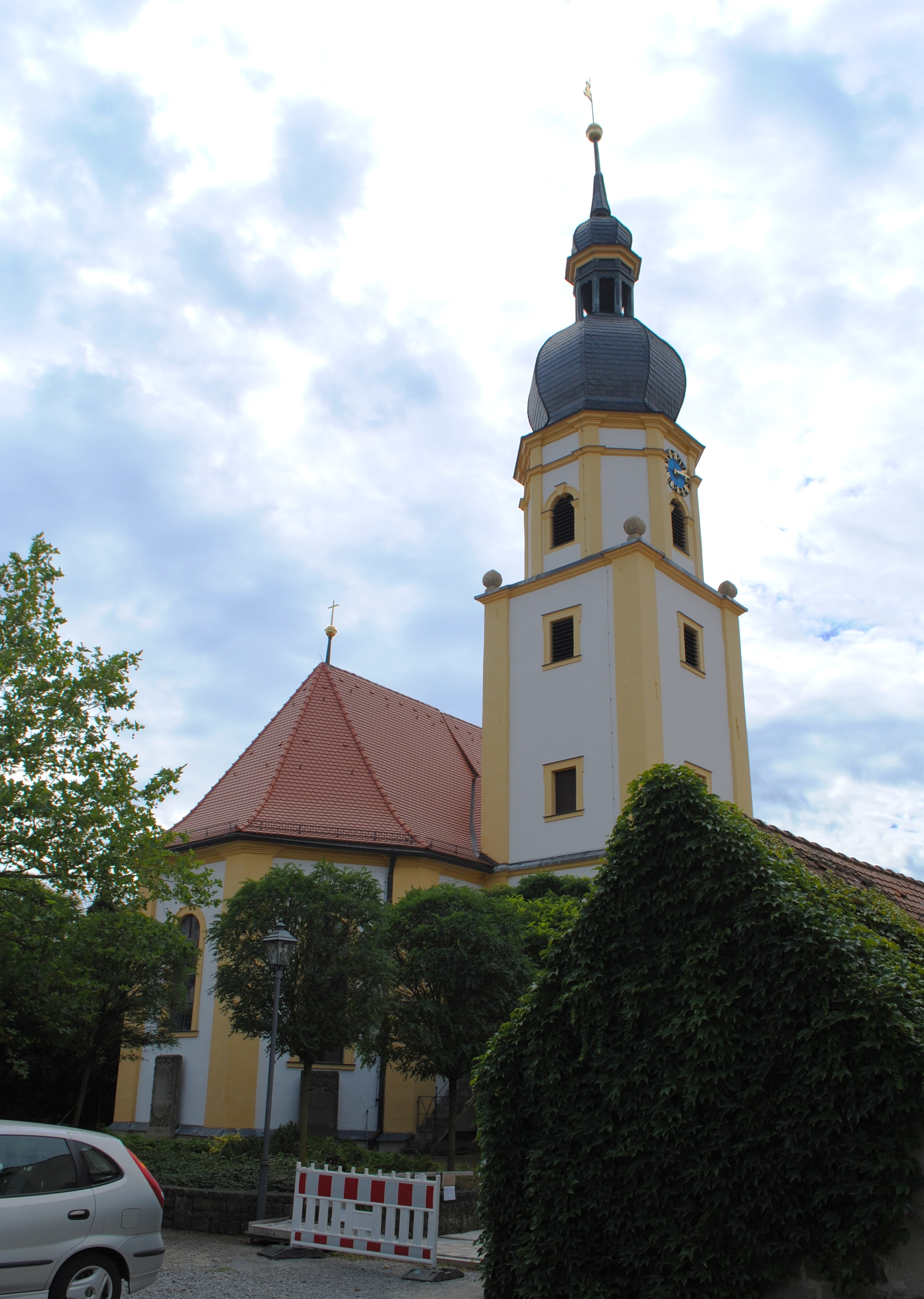 Kirche, RüdenhausenThis is a photograph of an architectural monument.